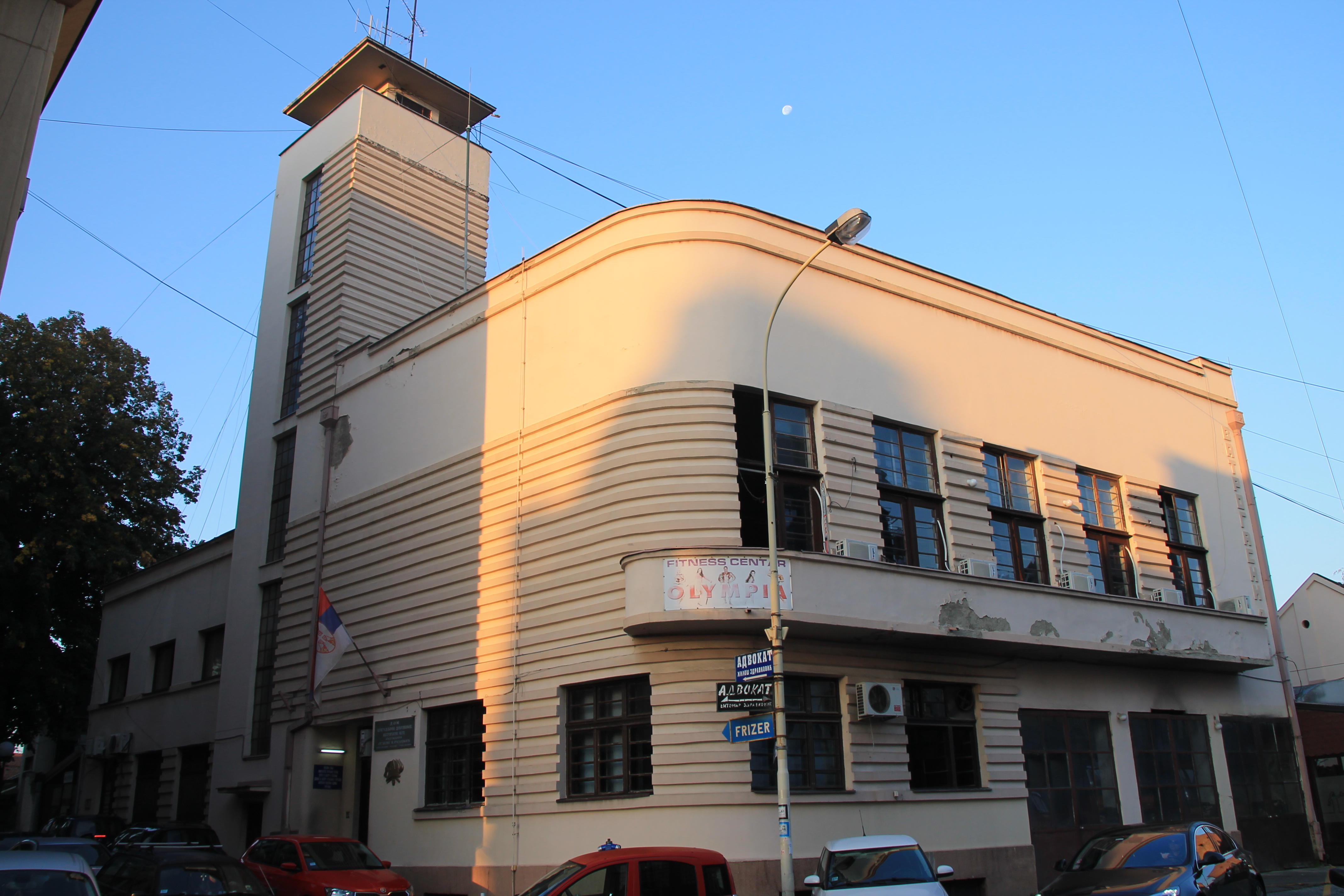 Vatrogasni dom u Kragujevcu